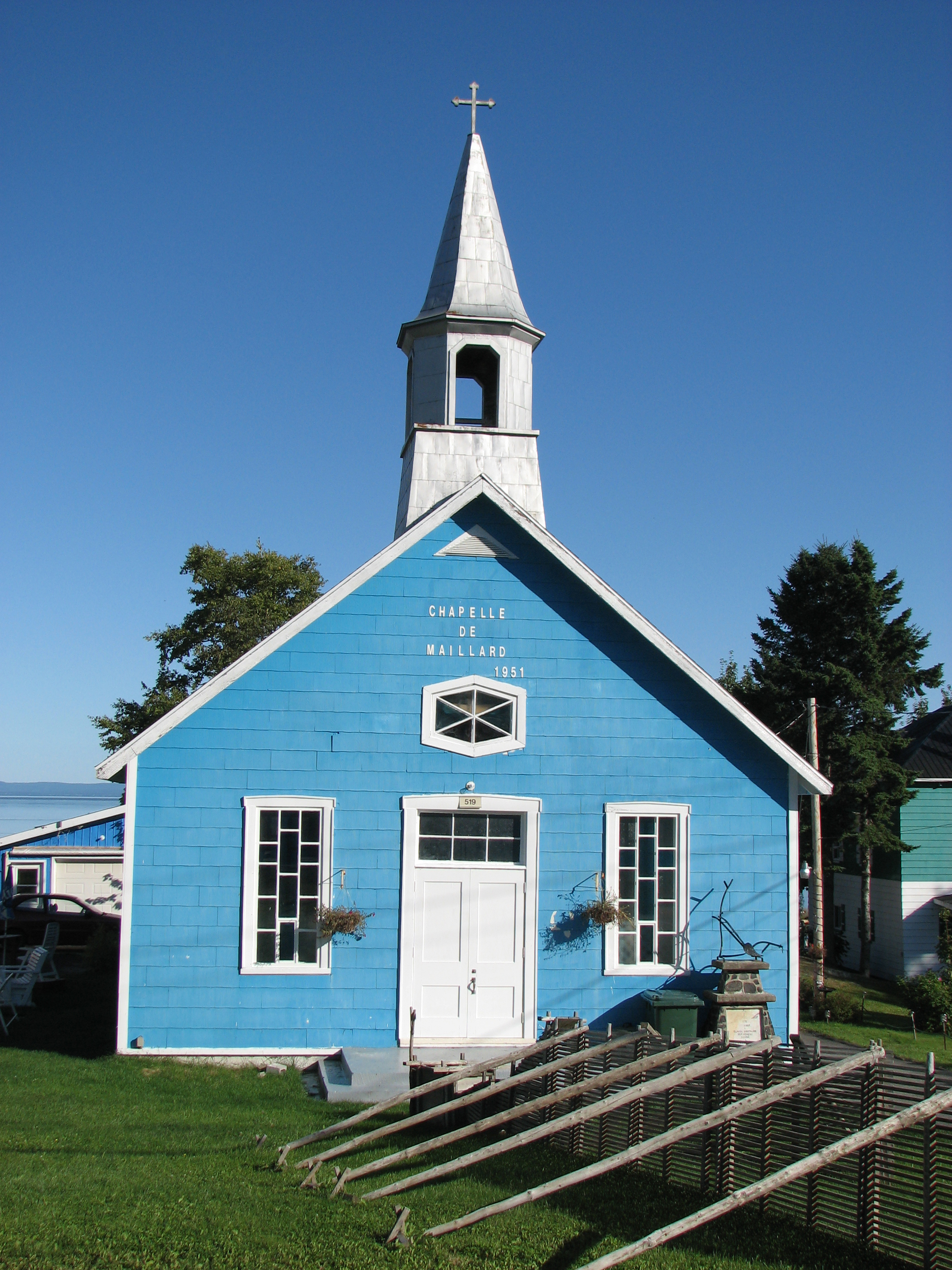 Chapelle de Maillard, à Petite-Rivière-Saint-François (Québec)